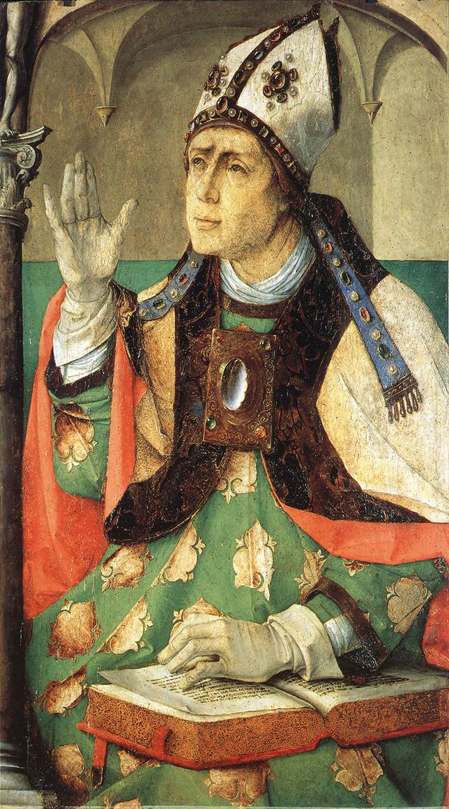 JOOS van Wassenhove St Augustine Oil on wood, 119 x 62 cm Musée du Louvre, Paris